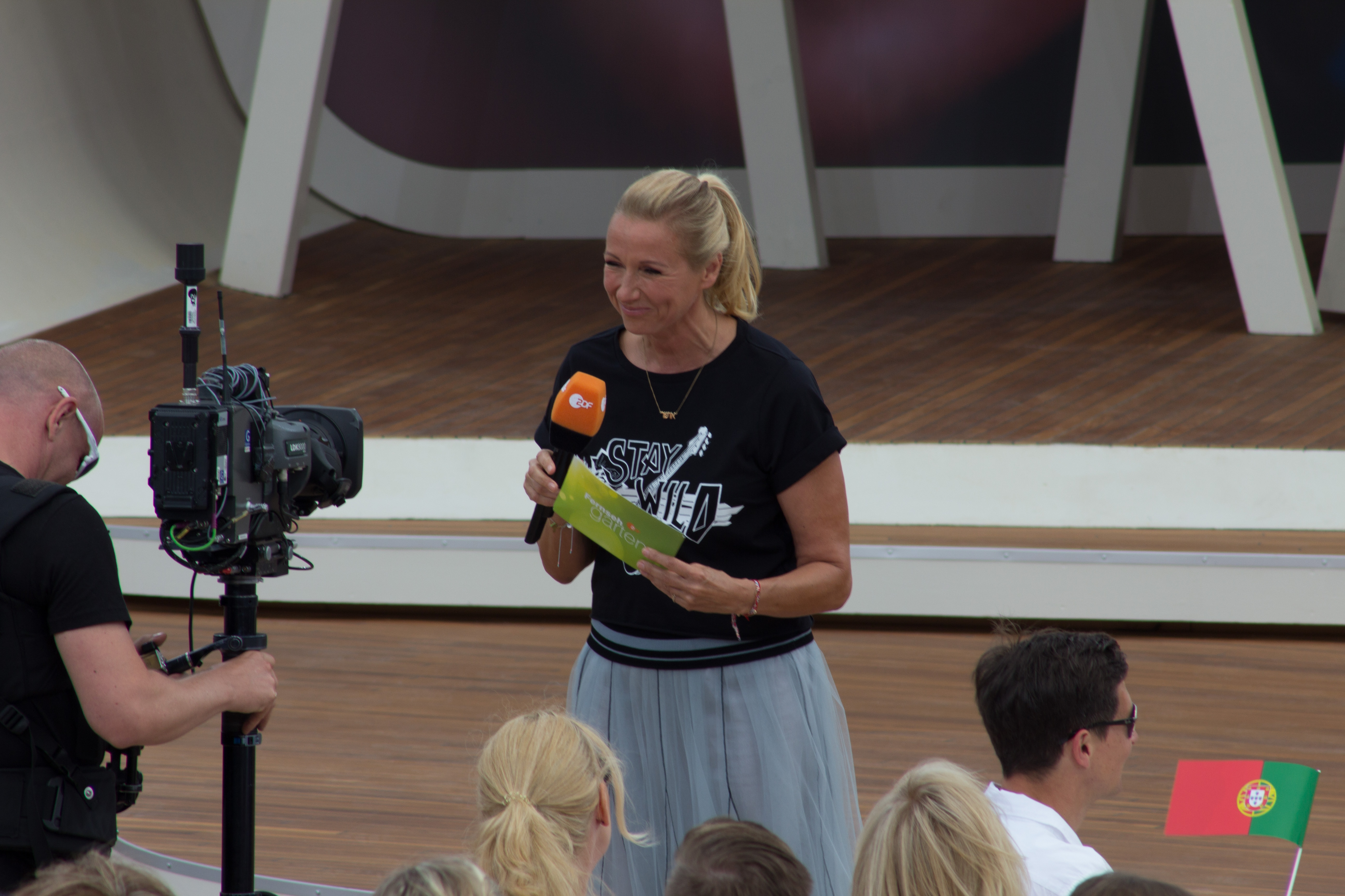 ZDF-Fernsehgarten am 13. Mai 2018 in Mainz.